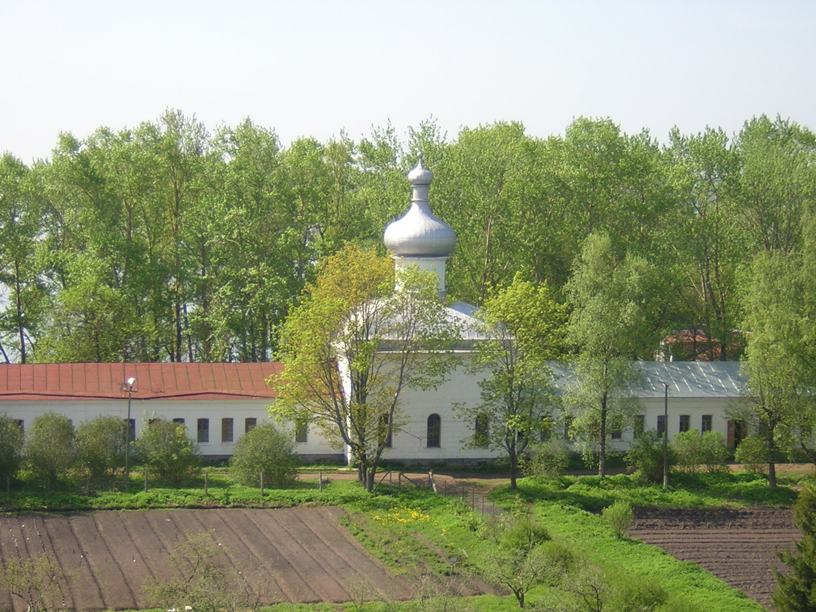 Церковь иконы Божьей Матери "Неопалимая Купина" Юрьева монастыря. Великий Новгород.